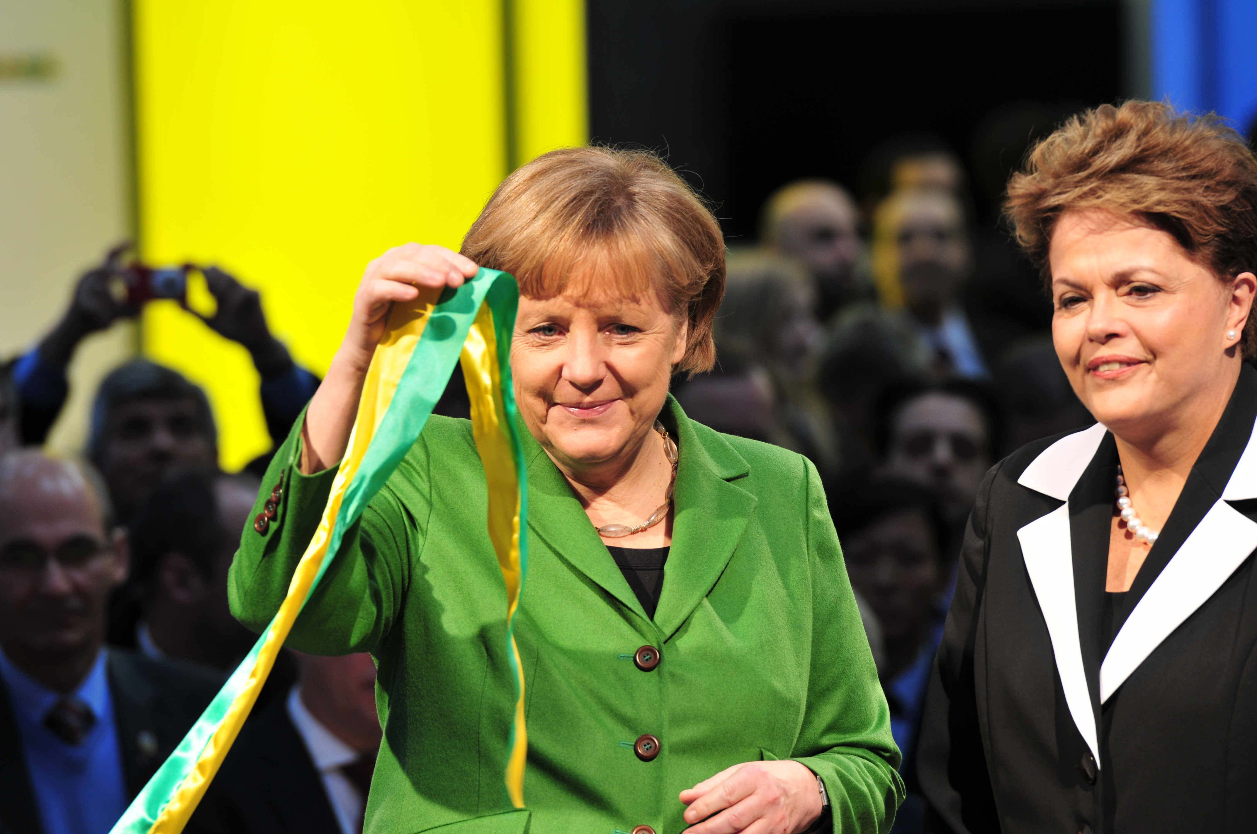 Angela Merkel bei der Eröffnung der CeBIT 2012 CeBIT 20126. bis 11. März in Hannover Dieses Foto wurde durch die Unterstützung von Wikimedia Österreich und die Twoonix Software GmbH ermöglicht.